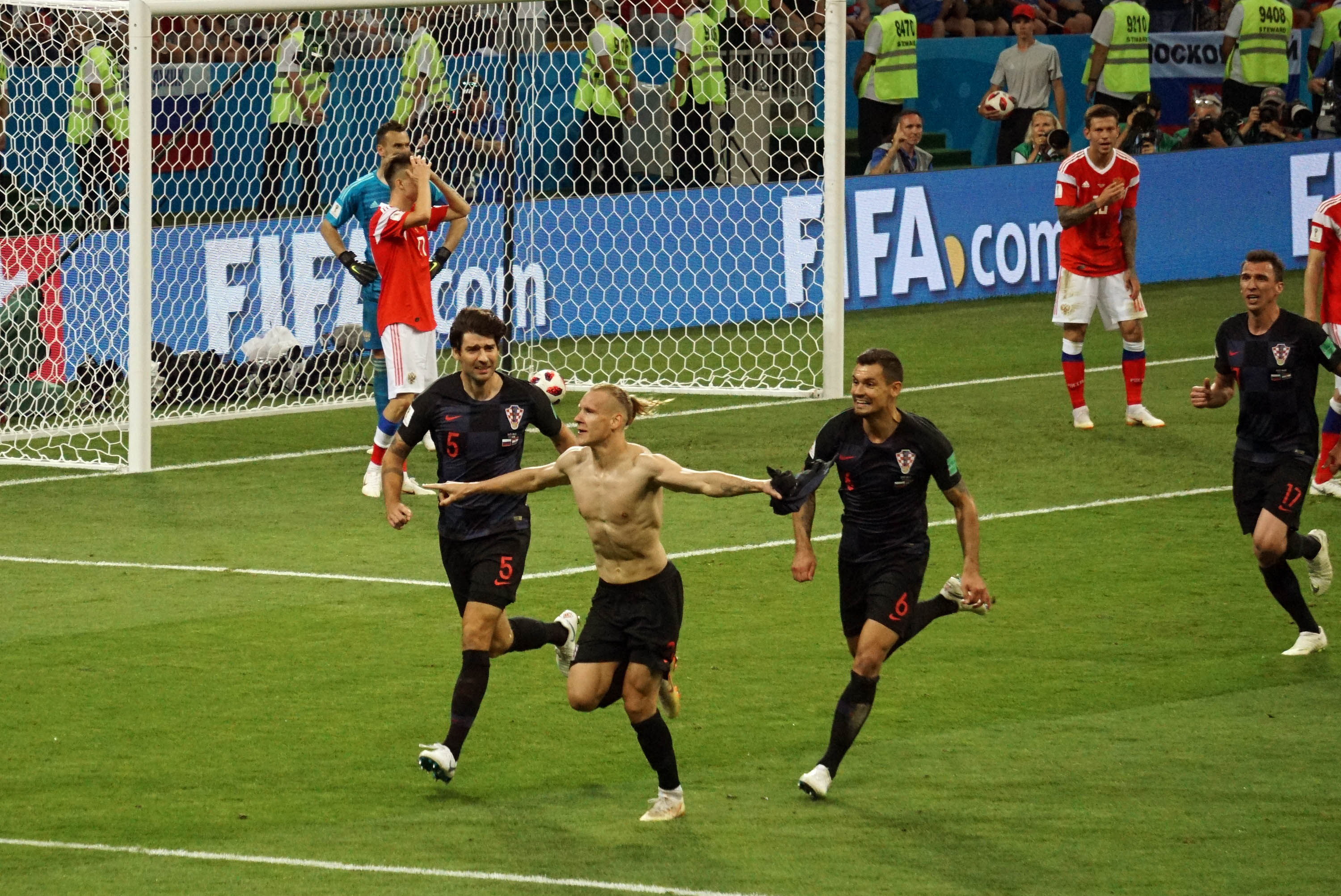 Домаго́й Ви́да (хорв. Domagoj Vida; 29 апреля 1989, Осиек, СФРЮ) — хорватский футболист, защитник турецкого клуба «Бешикташ» и национальной сборной Хорватии. 7 июля 2018 года сборная Хорватии обыграла сборную России со счётом 2:2 (4:3) по пенальти на ЧМ-2018 на стадионе «Фишт».